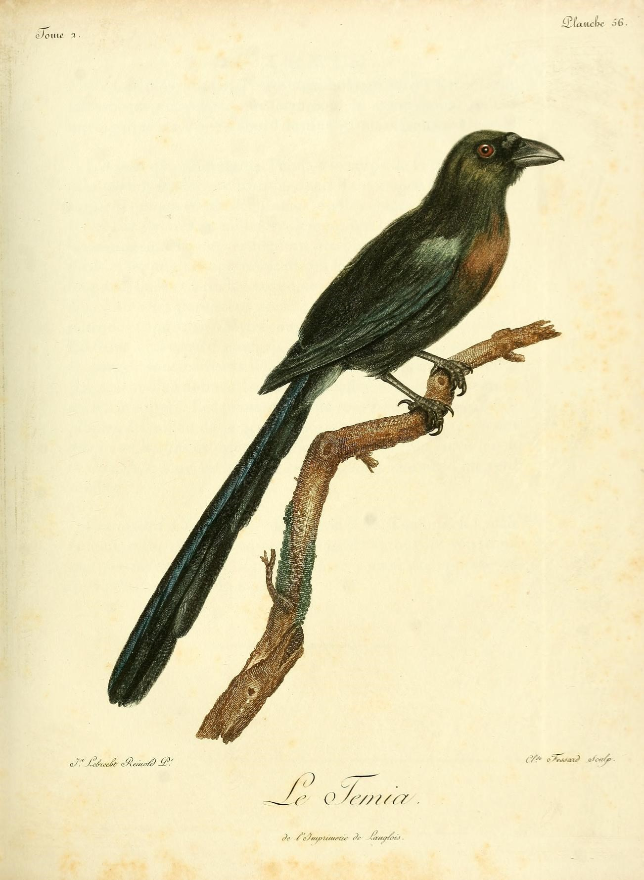 q)o1M£ 1 ■ iUaMcbe 66. Qj. Â'dtec/jt- n9\c/'.it./9 H / Cfi" ç'^eoiiax? ..l,~ti^B e /e/nt/z 9e / eJmpitmszn- m Imumi*